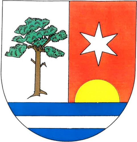 Znak, Borová, okres Svitavy